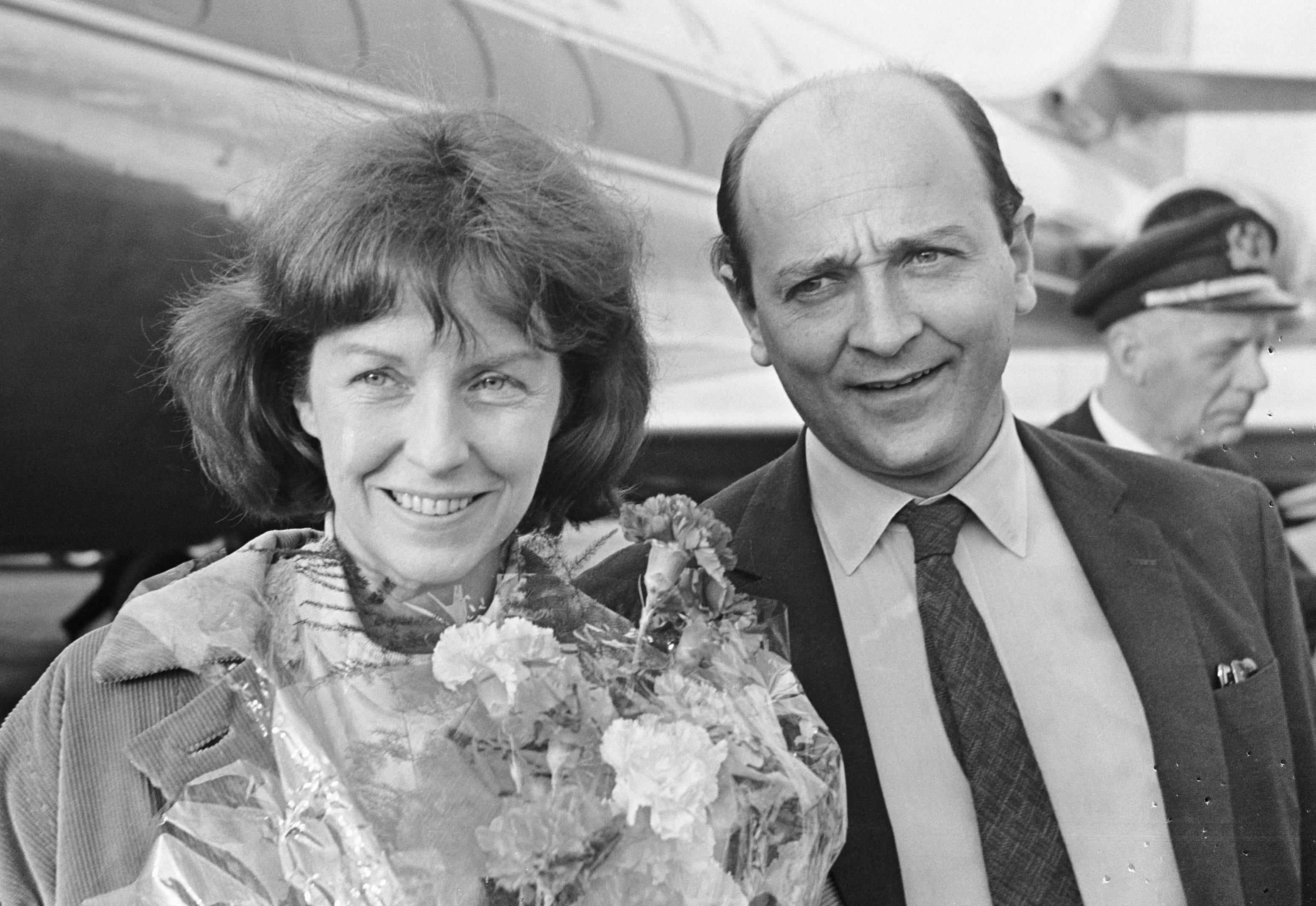 Aankomst op Schiphol van de Tsjechisch-Britse regisseur Karel Reisz met zijn vrouw de Amerikaanse actrice Betsy Blair